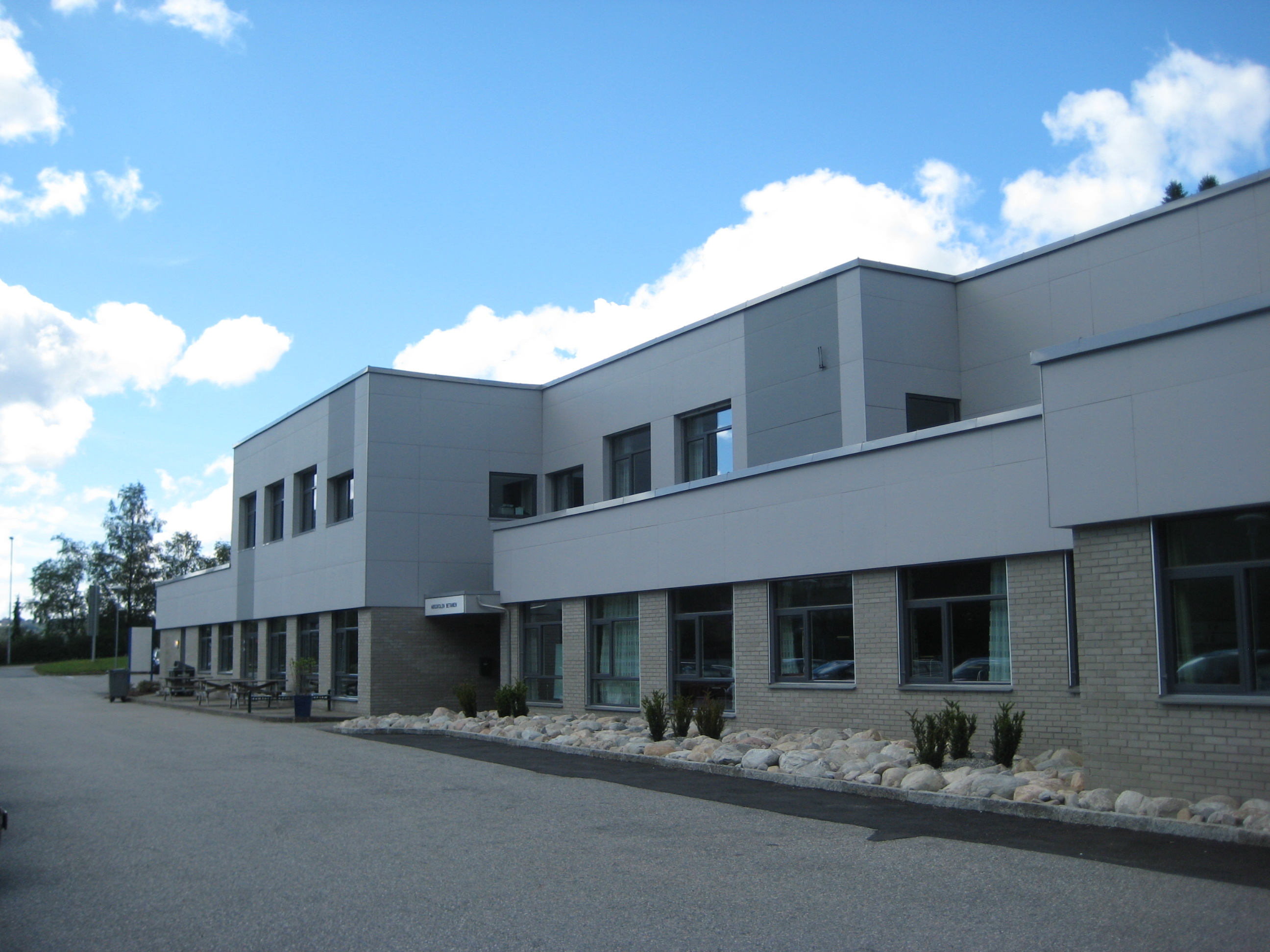 Fasade, Høgskolen Betanien, Fyllingsdalen, Bergen